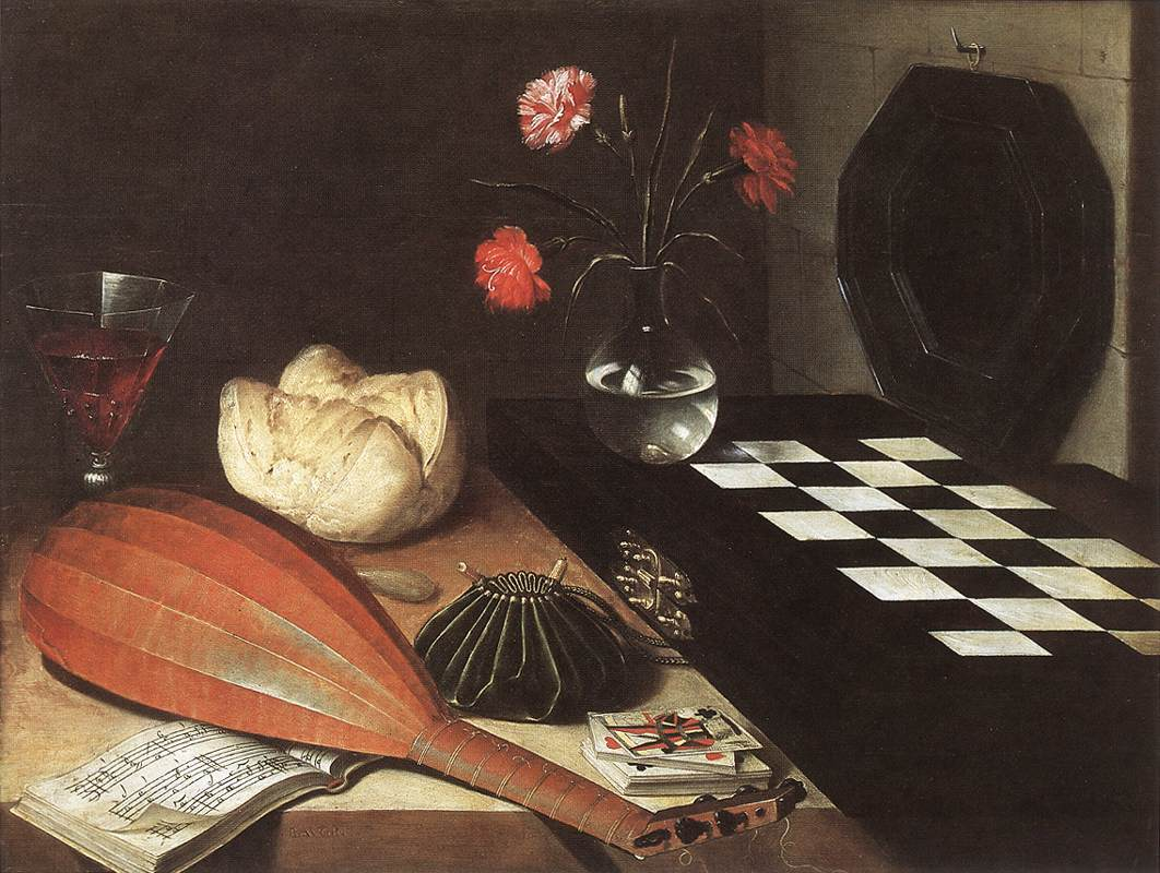 Still Life